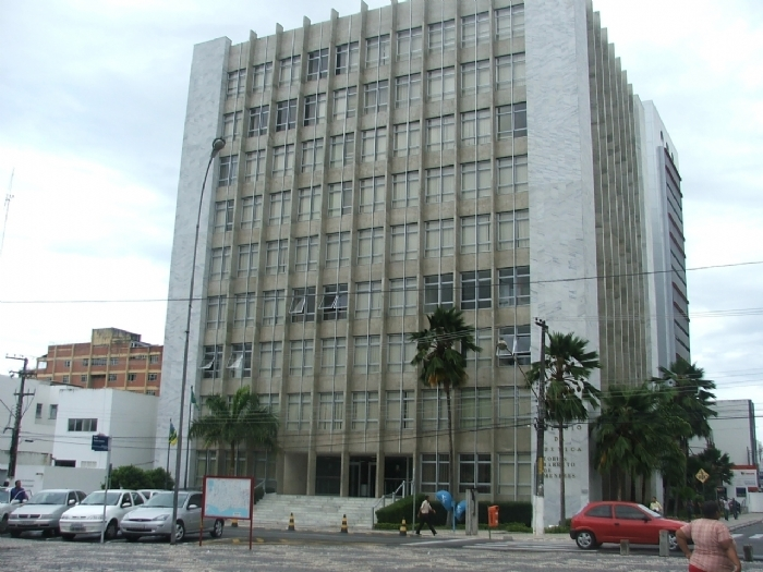 Fachada do Palácio Tobias Barreto, Sede do Tribunal de Justiça do Estado de Sergipe